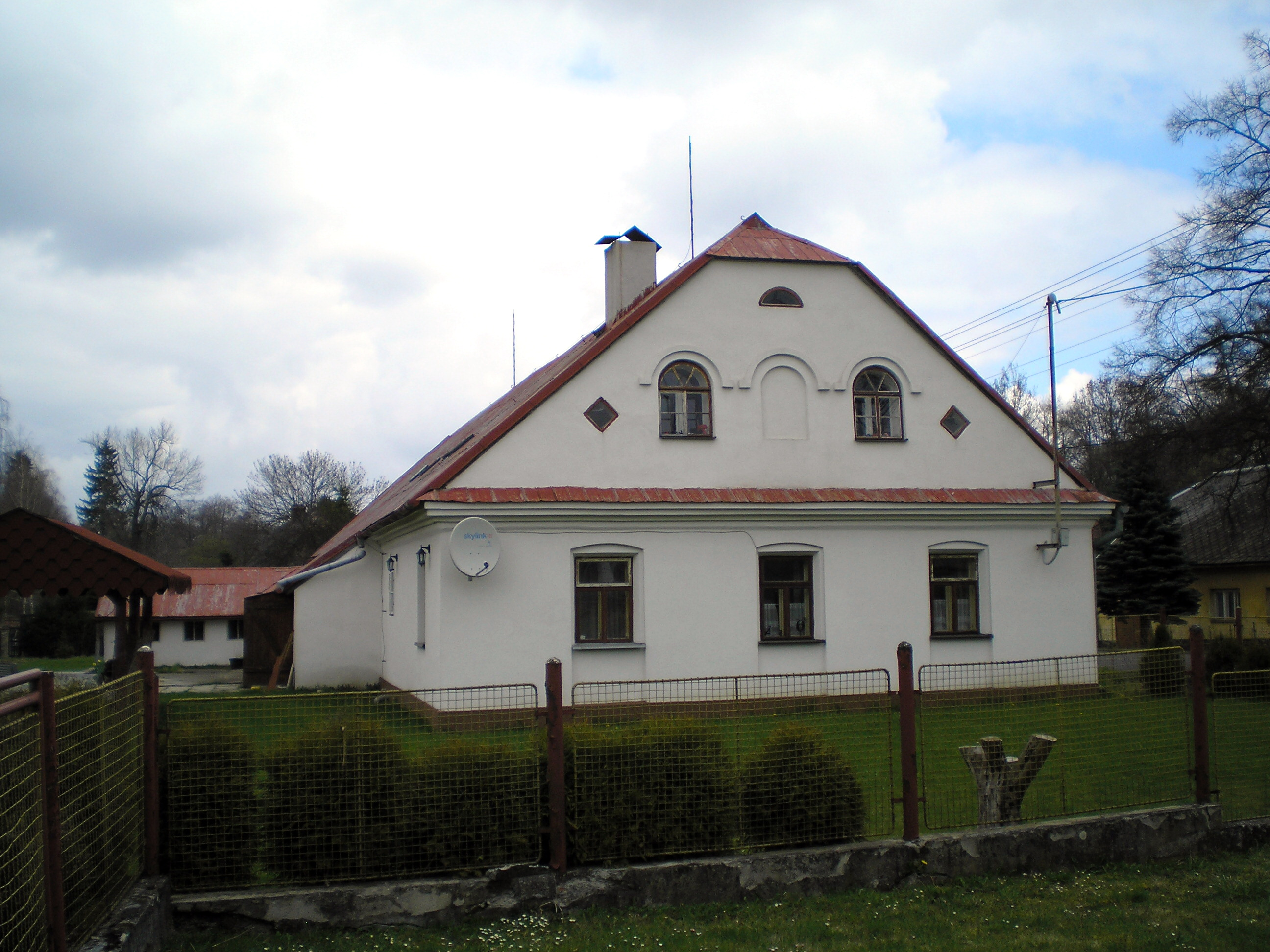 Venkovský dům (Lomnice), Lomnice 27